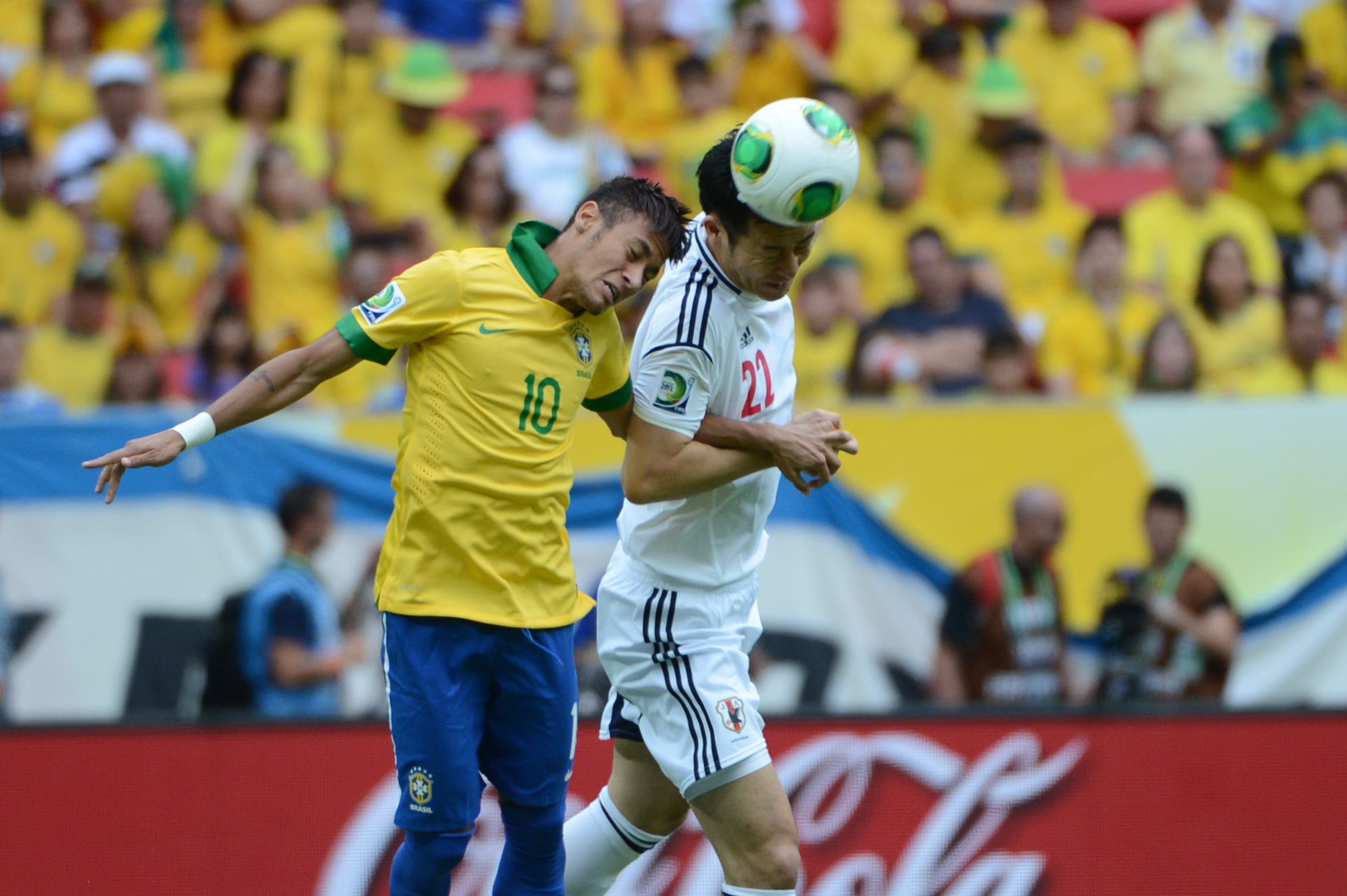 Jogo entre Brasil e Japão abre a Copa das Confederações